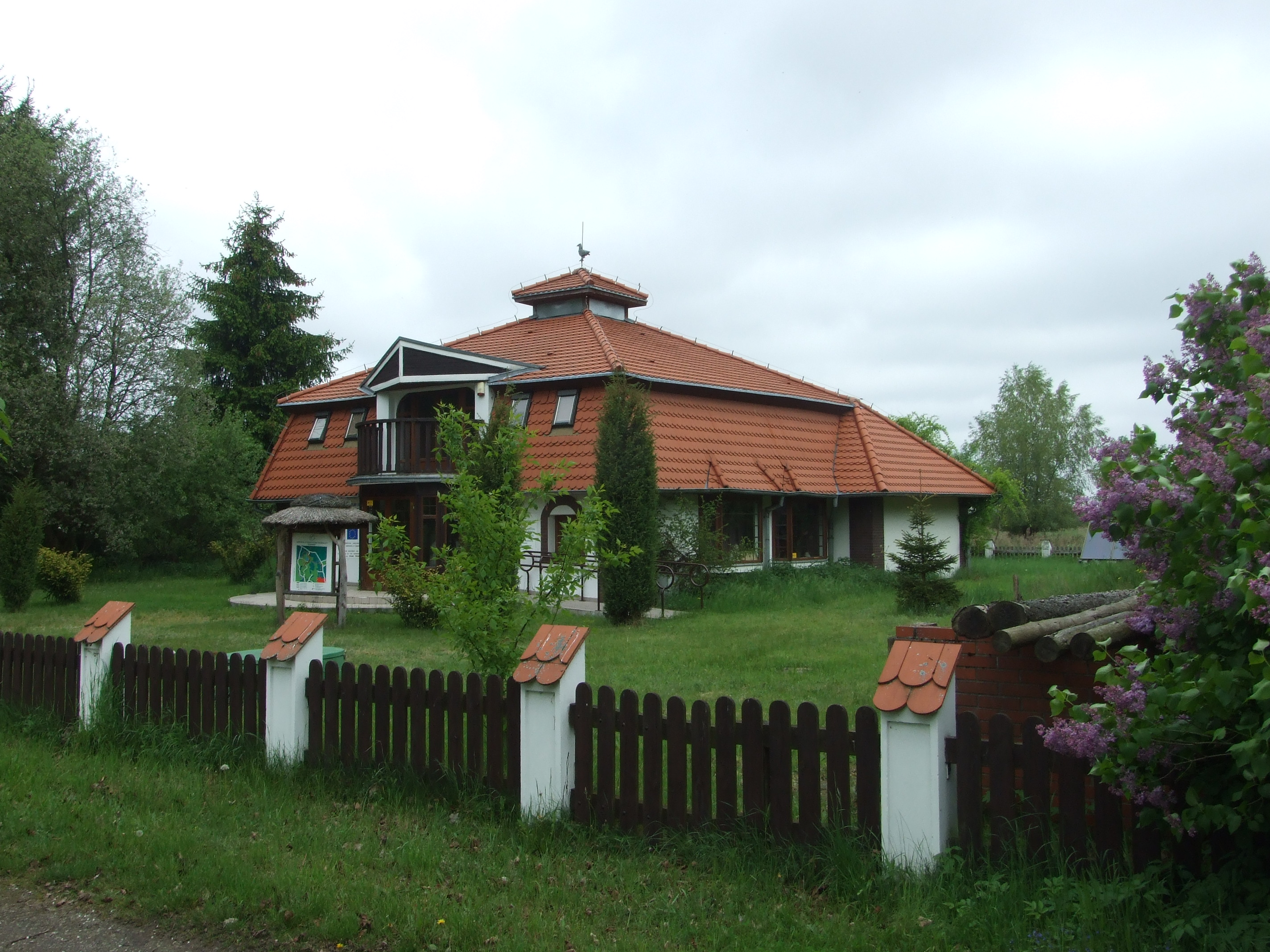 Ośrodek Dydaktyczno-Muzealny "Świdwie"